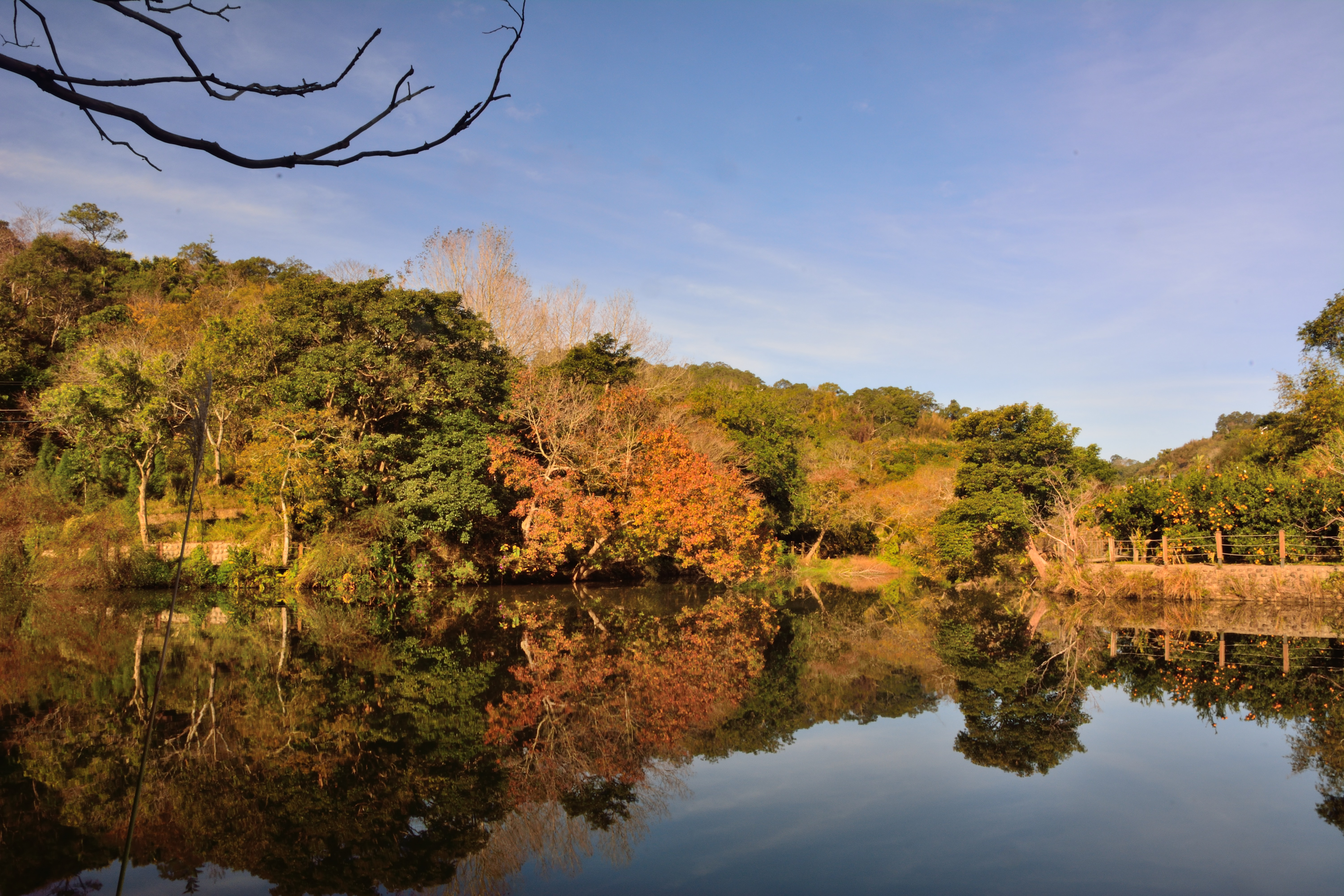 308, Taiwan, 新竹縣寶山鄉油田村